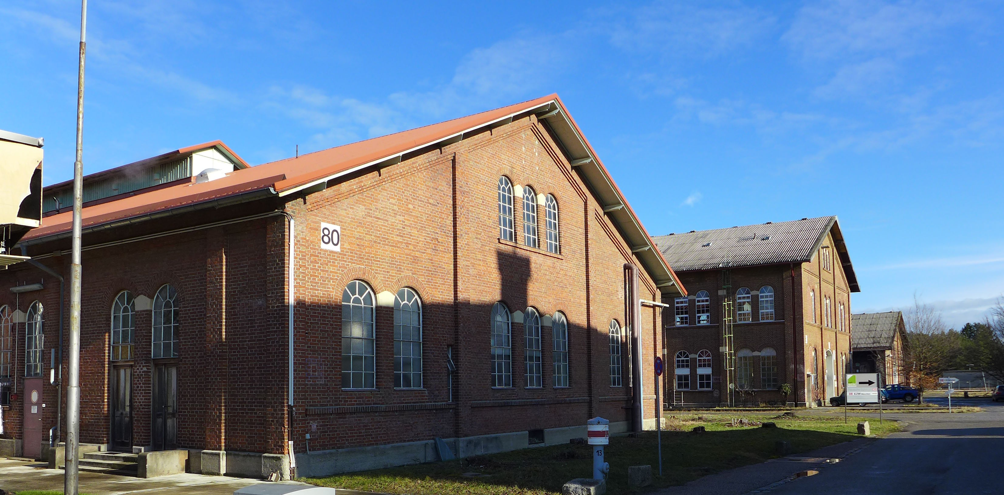 Papinstr. 53, München